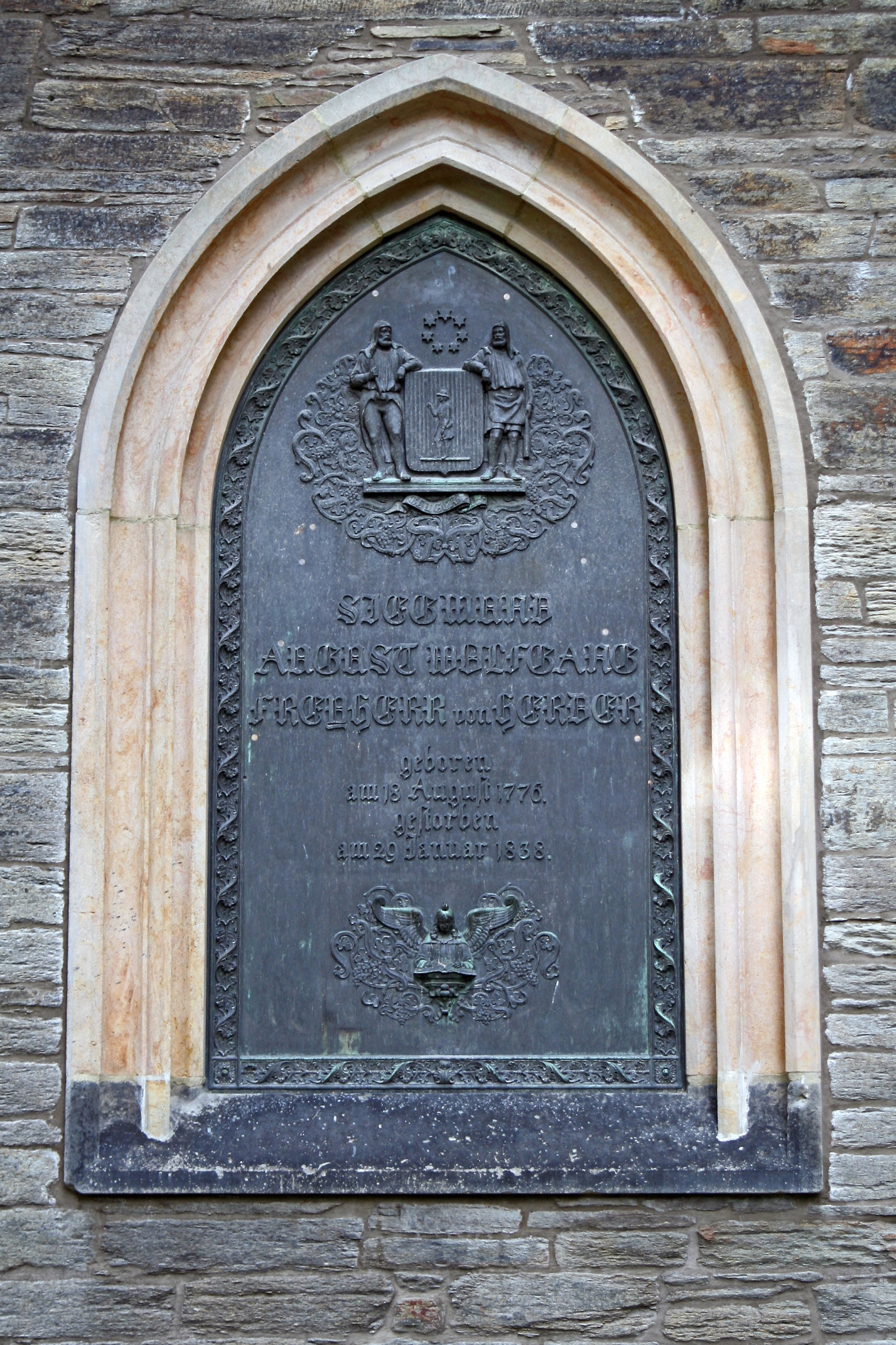 Herders Ruhe, Herder's grave, detail